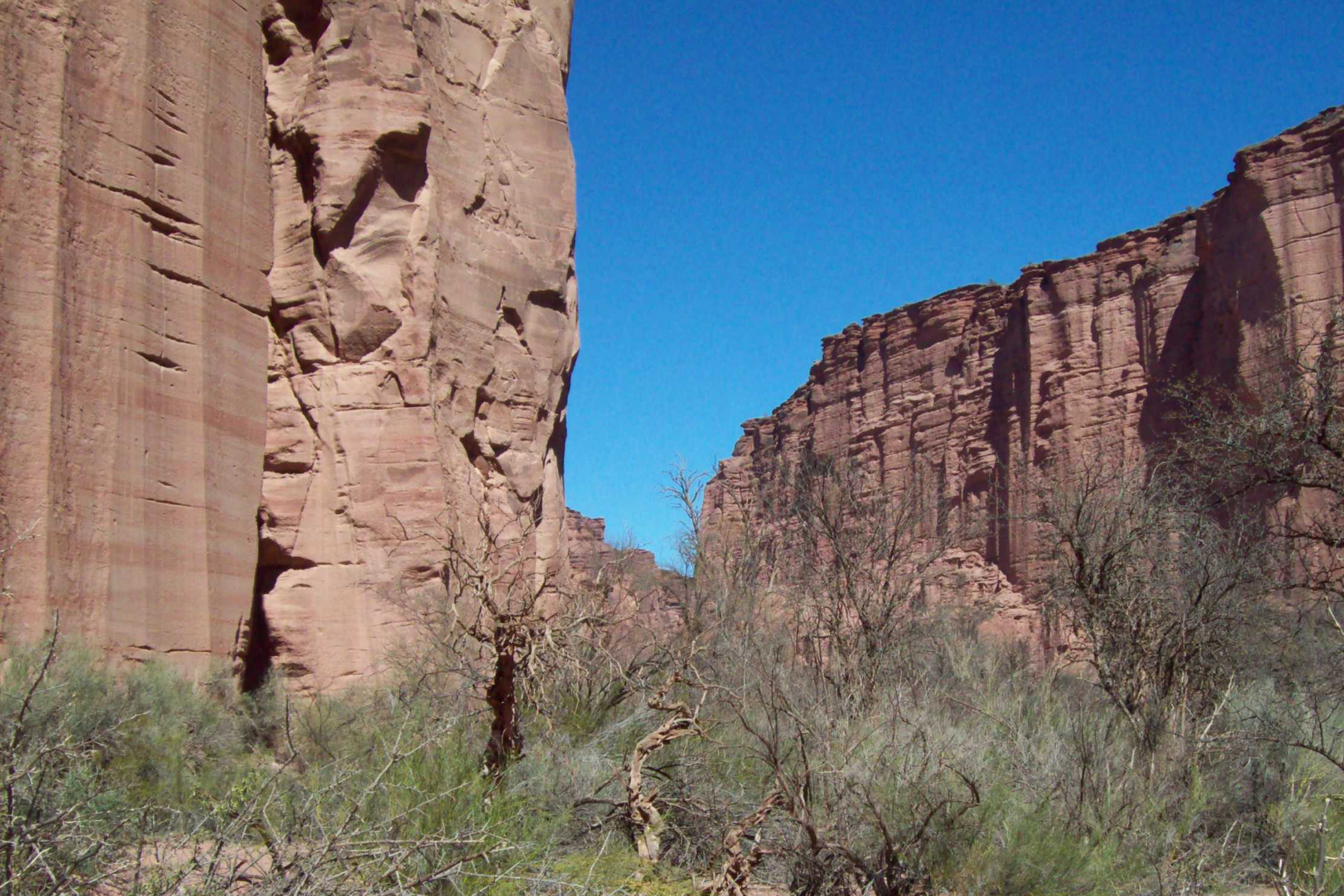 Yacimiento de Talampaya